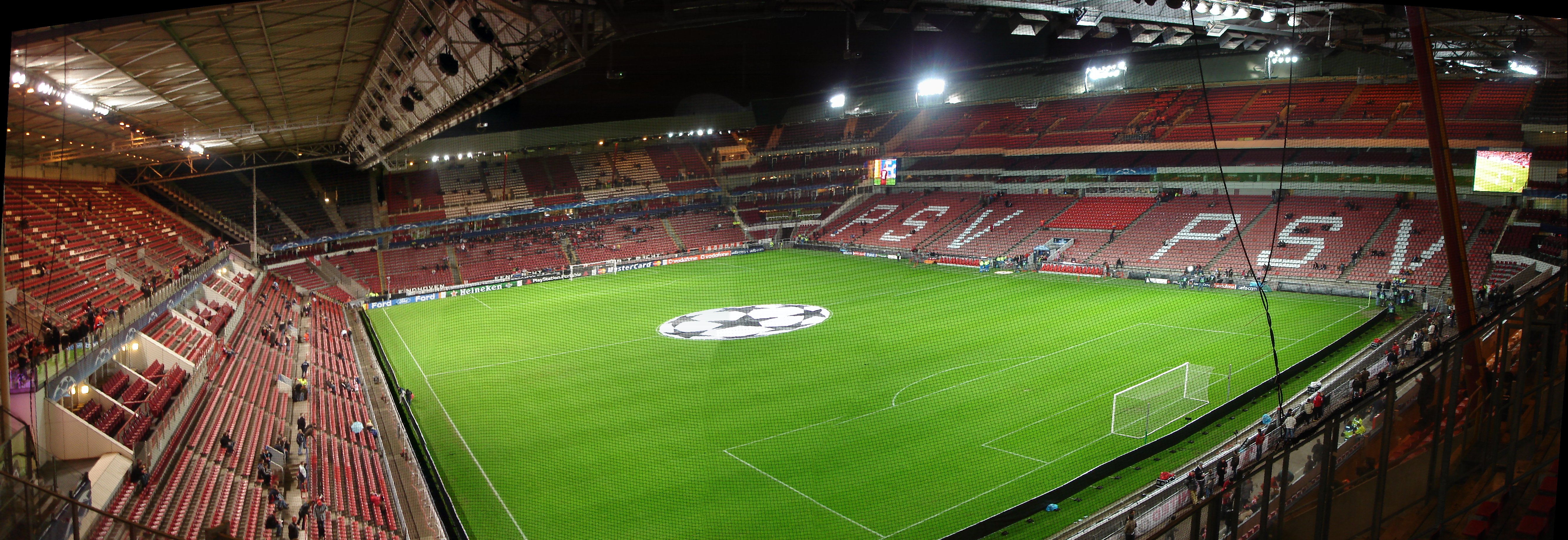 Panorama du Philips Stadion